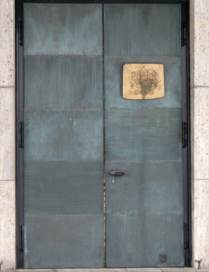 St.-Pius-Kirche in Mannheim-Neuostheim.